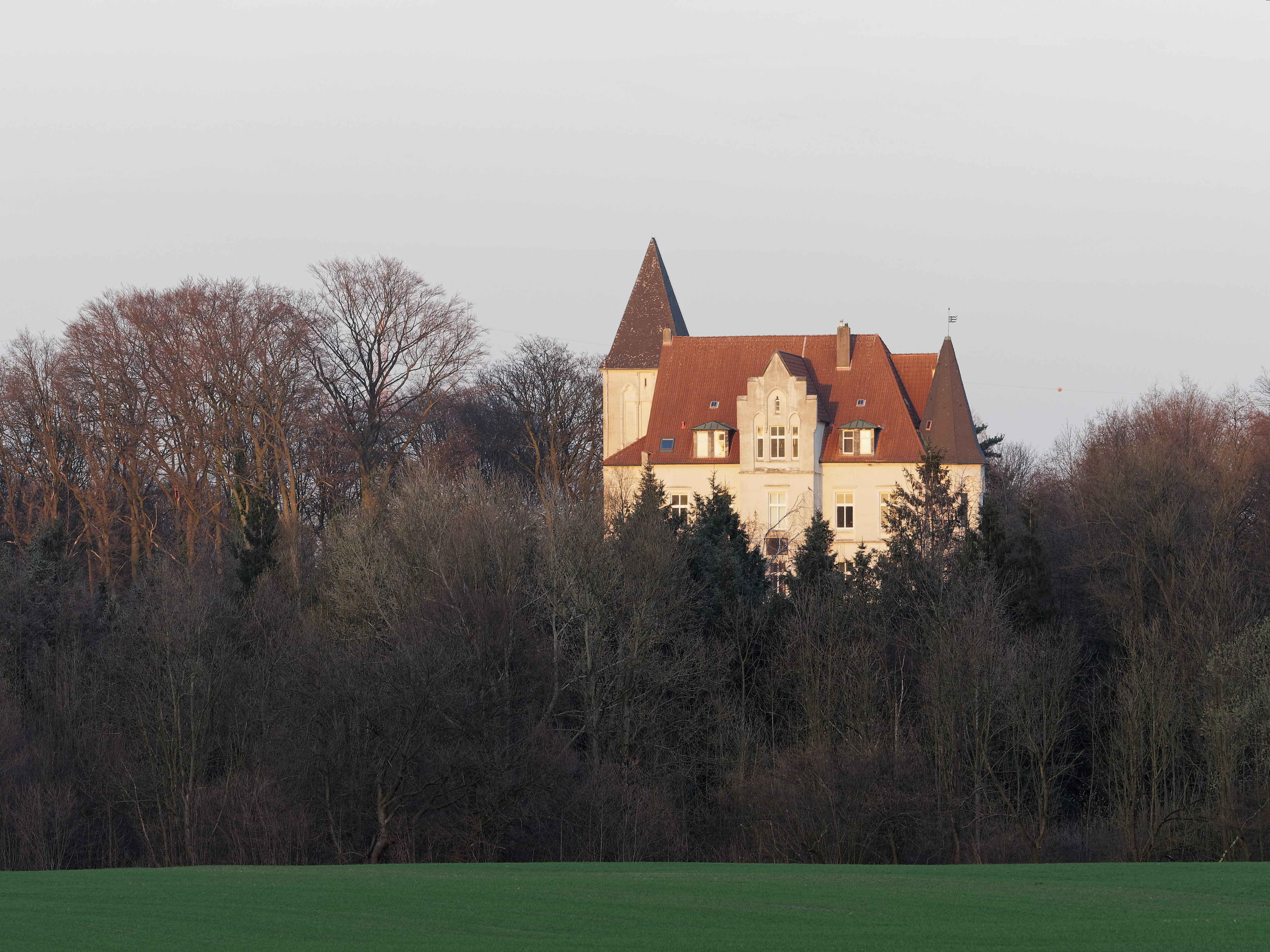 Die Westseite von Haus Dorloh in Castrop-Rauxel Dingen, Dorlohstraße